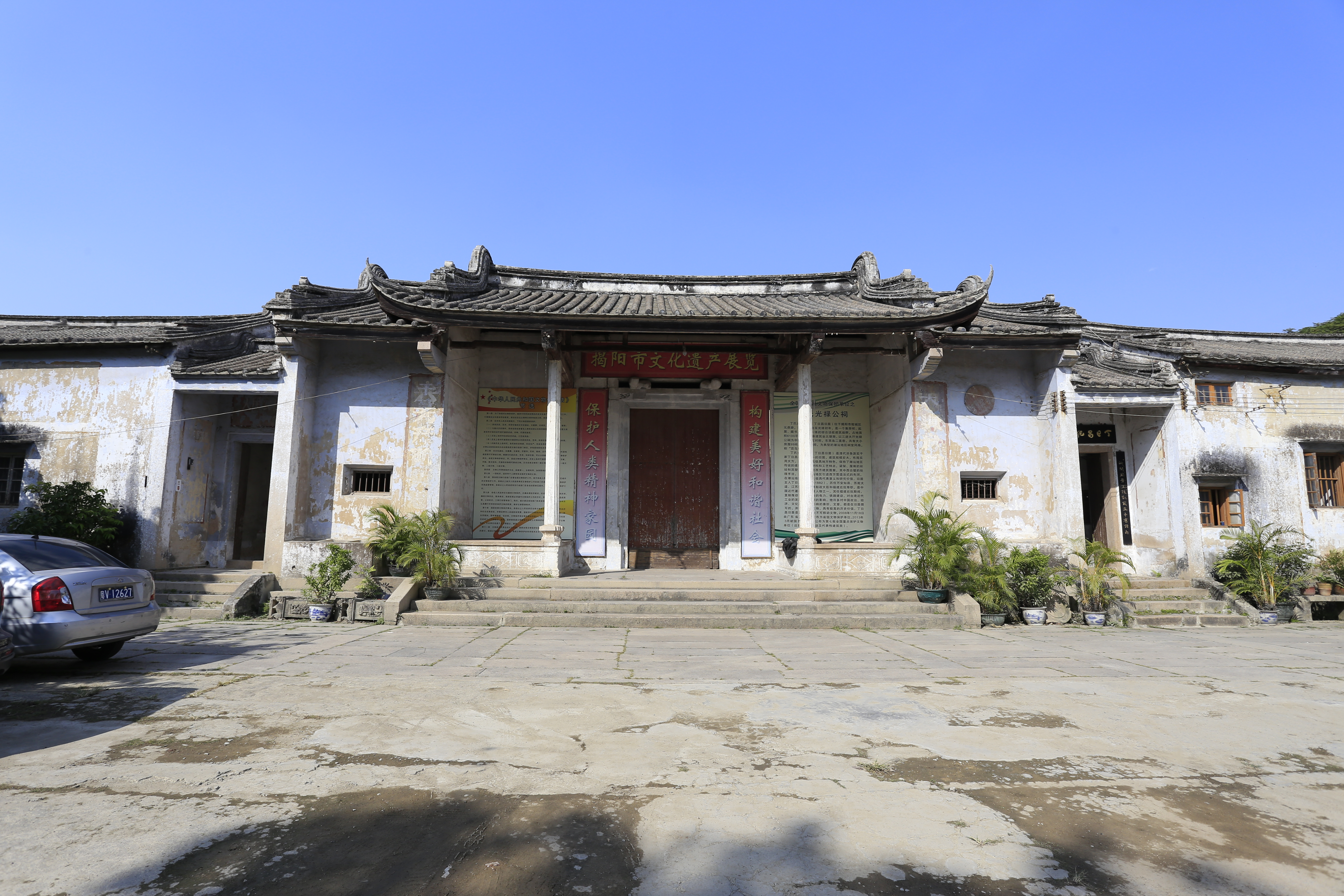 揭阳 丁氏光禄公祠（丁日昌故居）